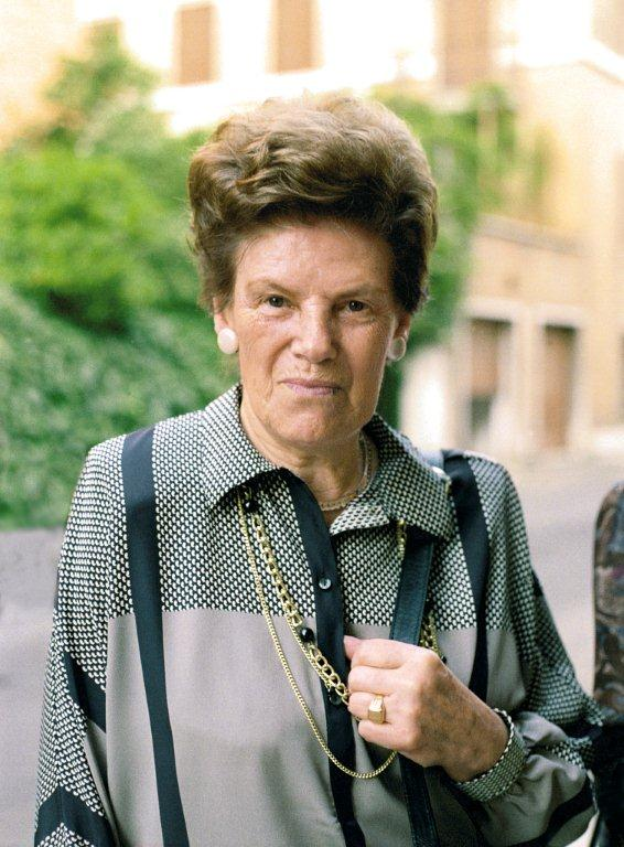 Una collaboratrice domestica, con una grande competenza professionale.